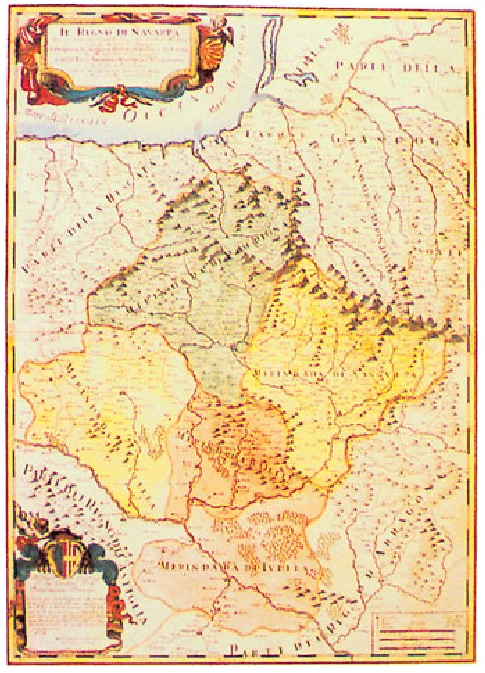 “El Reino de Navarra”. Cantelli. 1690. (Nafarroako Artxibo Nagusia).